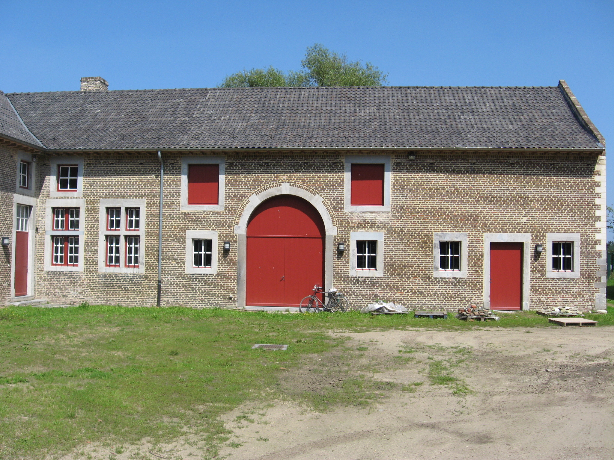 Tuiltermolen in Kuringen